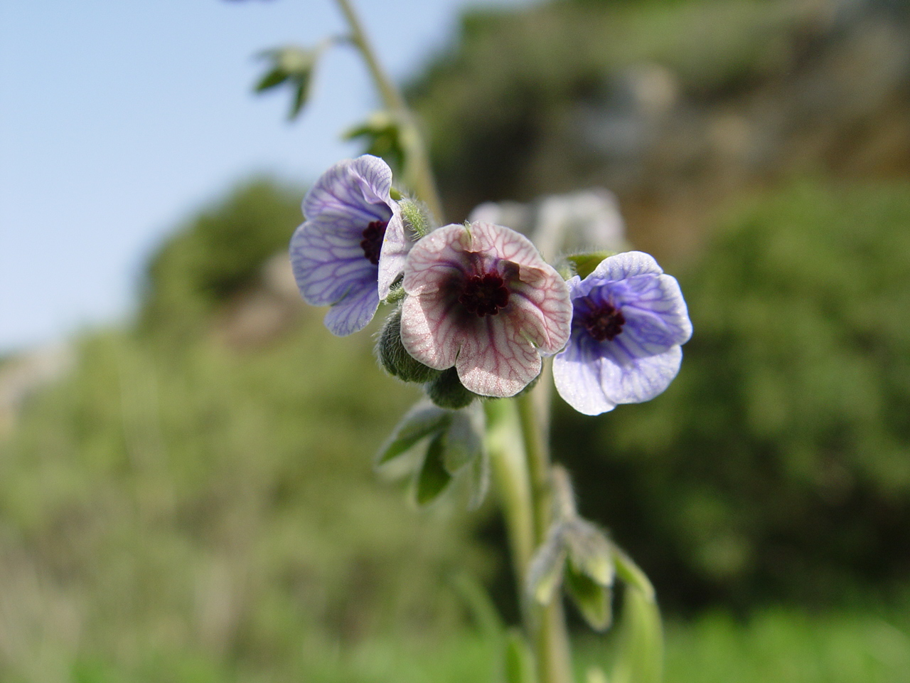 Name Cynoglossum creticum Familiy Boraginaceae Used in Article Cynoglossum creticum.